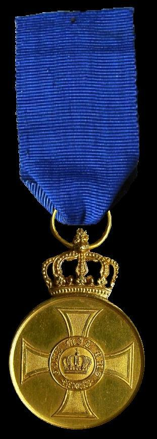 Scan van een medaille. Bewerkt met paint om een zwarte achtergrond te scheppen. Geen auteursrechten Robert Prummel 19 jun 2006 16:35 (CEST)